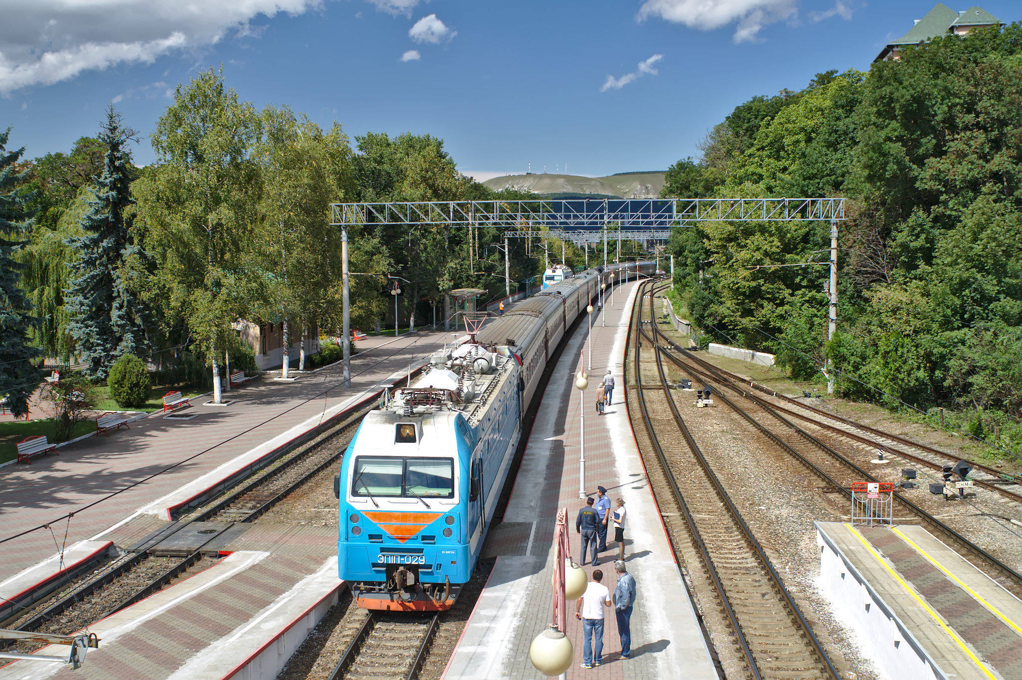 ЭП1П-029 с поездом Екатеринбург - Кисловодск прибывает на станцию Кисловодск. см. фото 538463 в альбоме автора